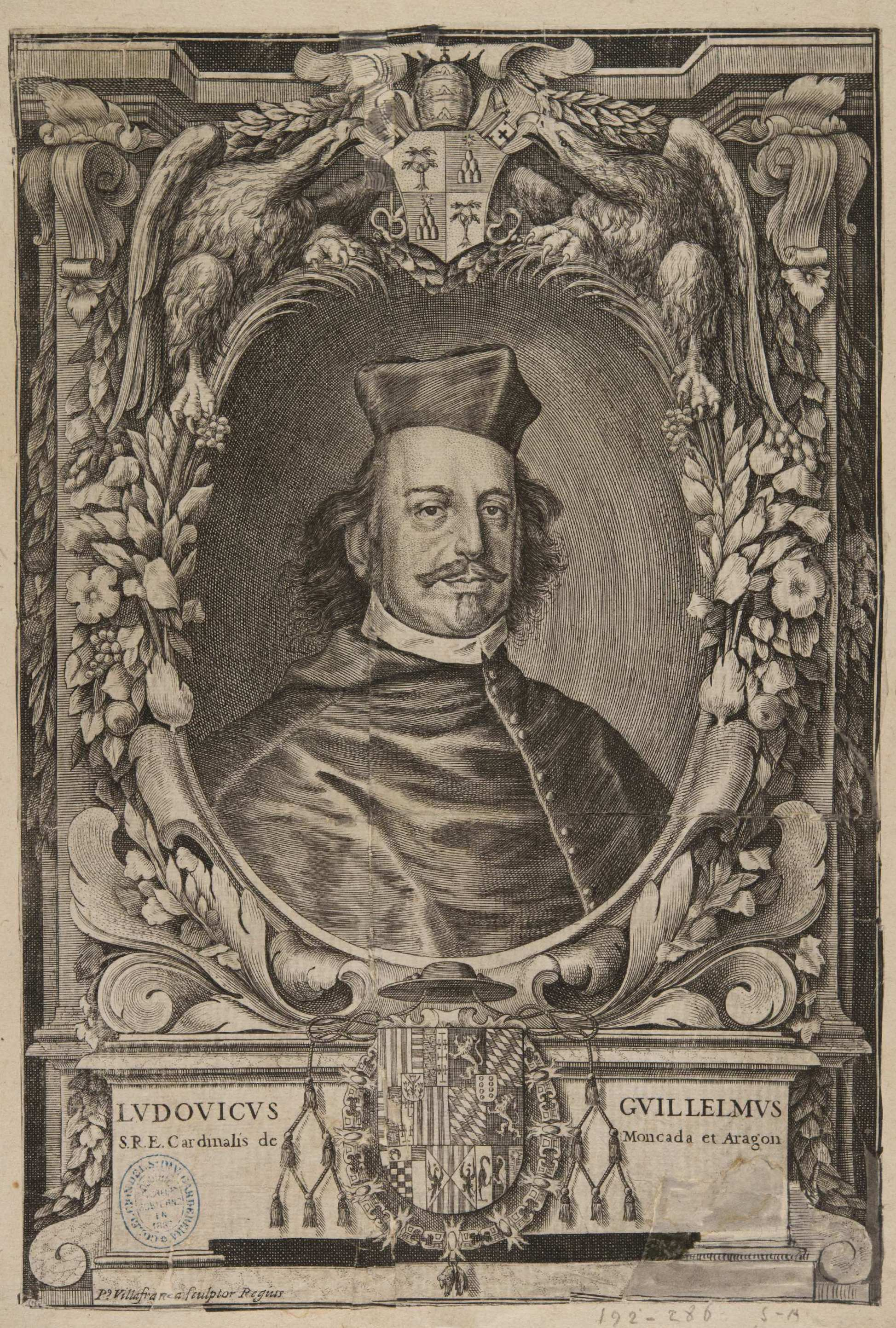 Luis de Moncada y Aragón, aguafuerte y buril firmado por Pedro de Villafranca como grabador del rey en Madrid, 1668, publicado al frente de la obra del carmelita Alonso de San Jerónimo, "Vida, virtudes y milagros de... Ana de San Agustín, carmelita descalza", Madrid, Francisco Nieto, 1668